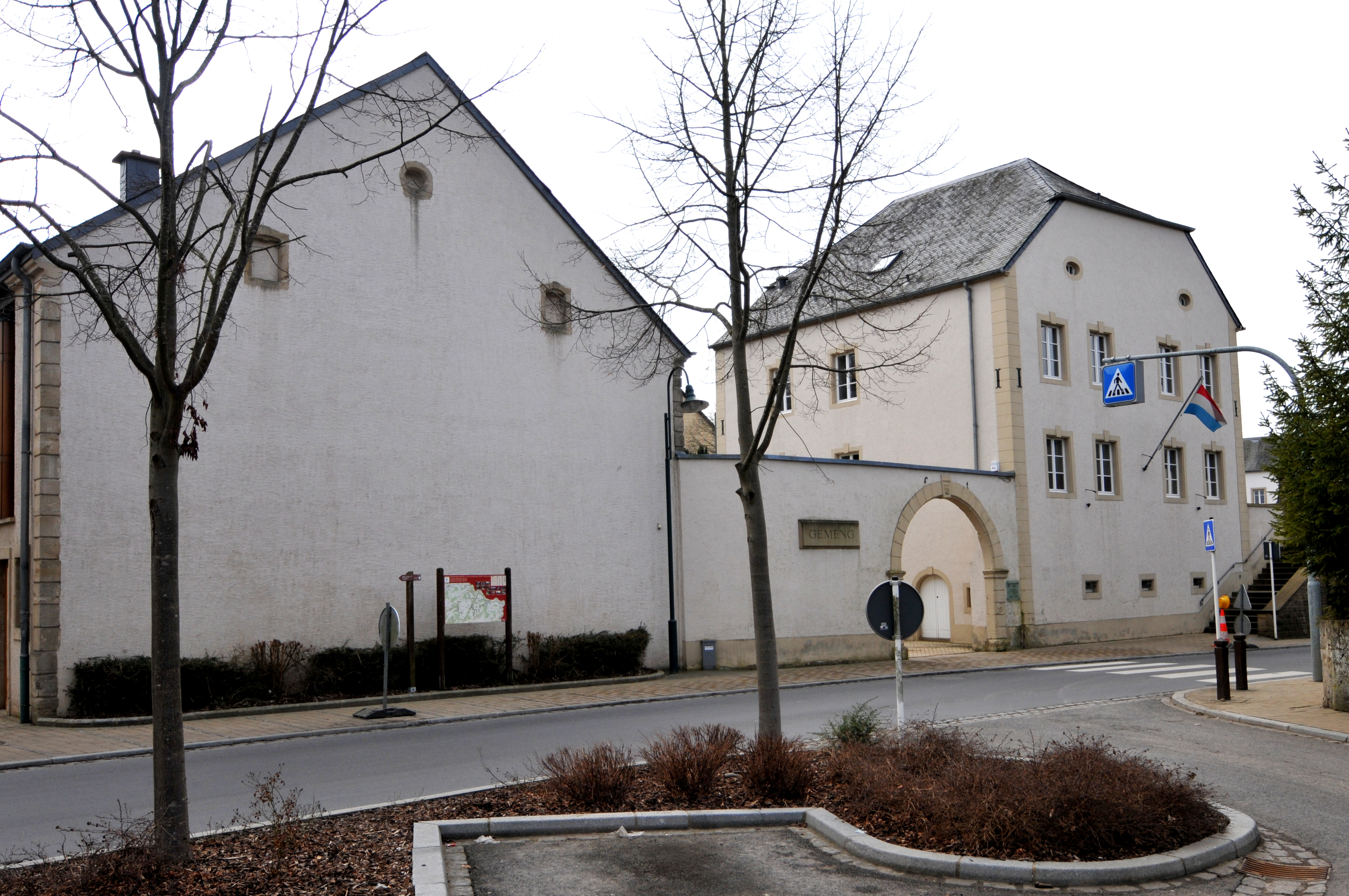 Déi nei Märei zu Hiefenech.